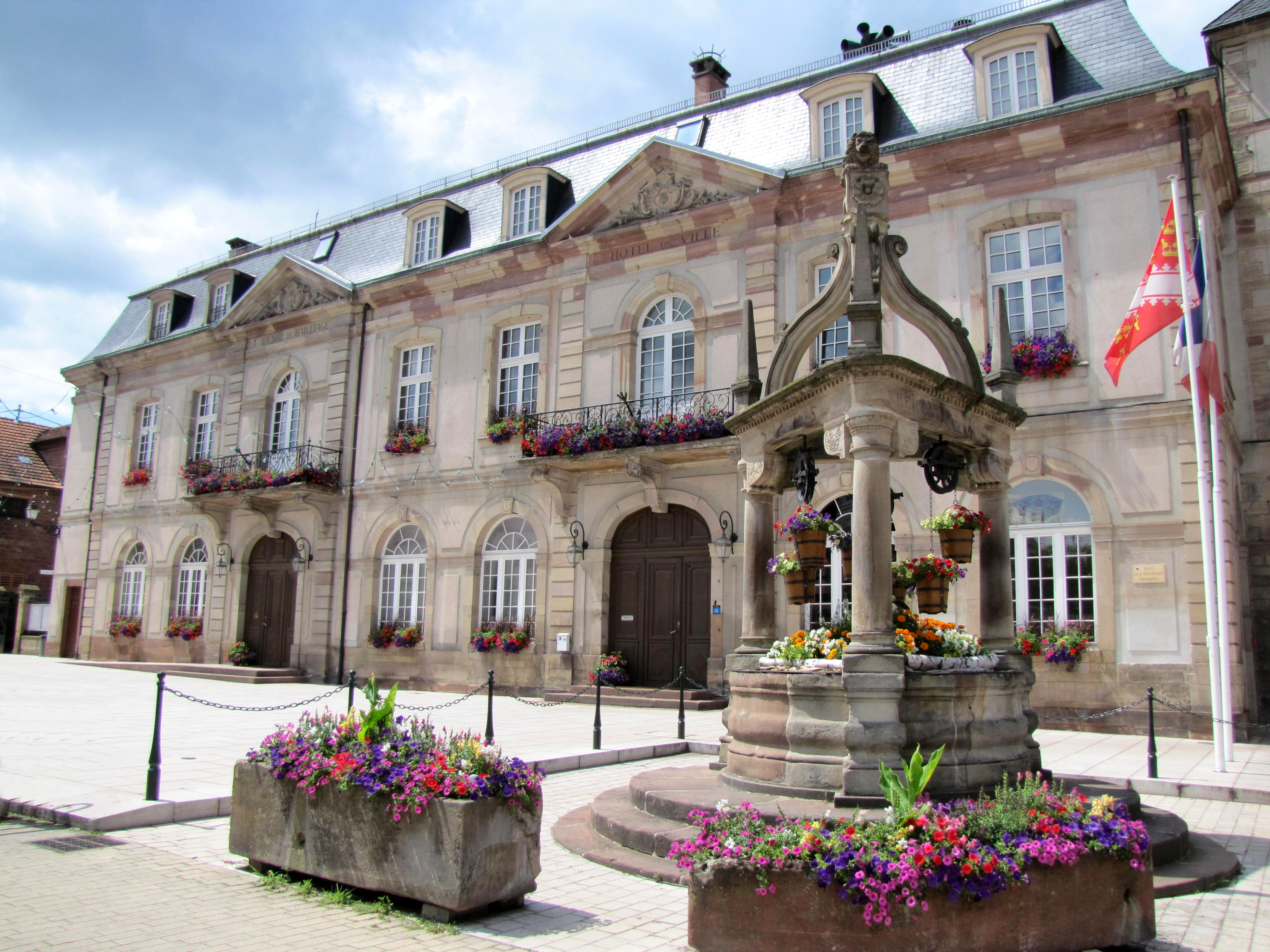 Alsace, Bas-Rhin, Rosheim, Hôtel de Ville et Tribunal (XVIIIe-XIXe), 84 rue du Général-de-Gaulle: Puits aux six seaux (1605)